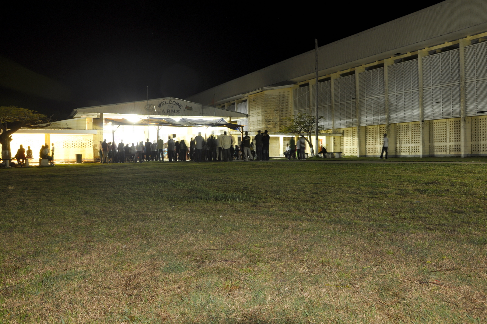 Anna Regina Multilateral School